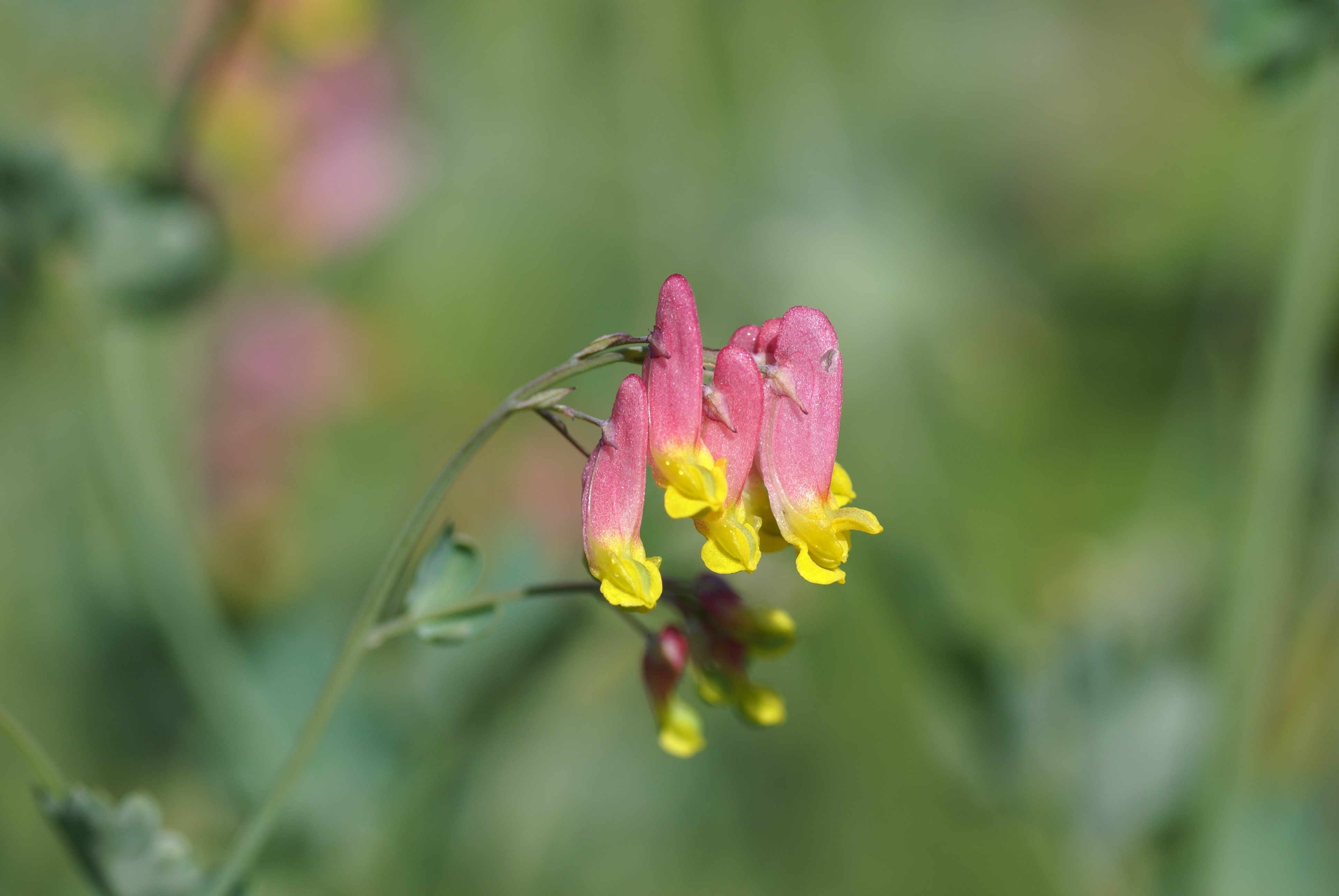 Plant species Capnoides sempervirens shot in Bergianska trädgården, northern Stockholm